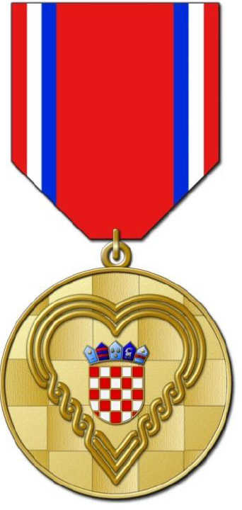 Zlatna domovinska medalja